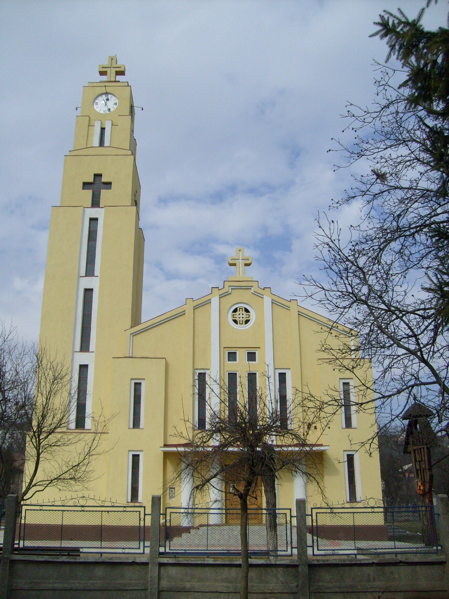 Biserica "Buna-Vestire" ridicata de Iuliu Hossu in cartierul Iris din Cluj.